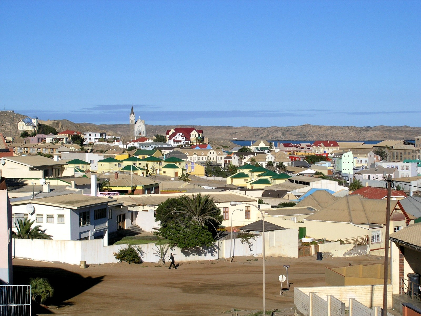 Luderitz, Blick ueber die Stadt vom Nautilusberg